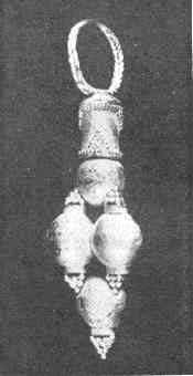 گوشواره‌ای از دوران ایلامیان